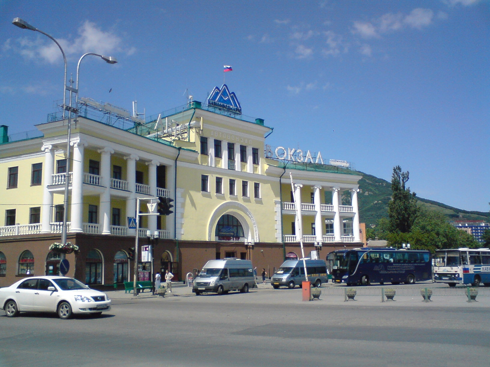 Вид со стороны улицы Бунимовича